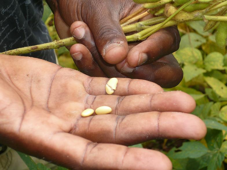 Centre de formation agricole à voka